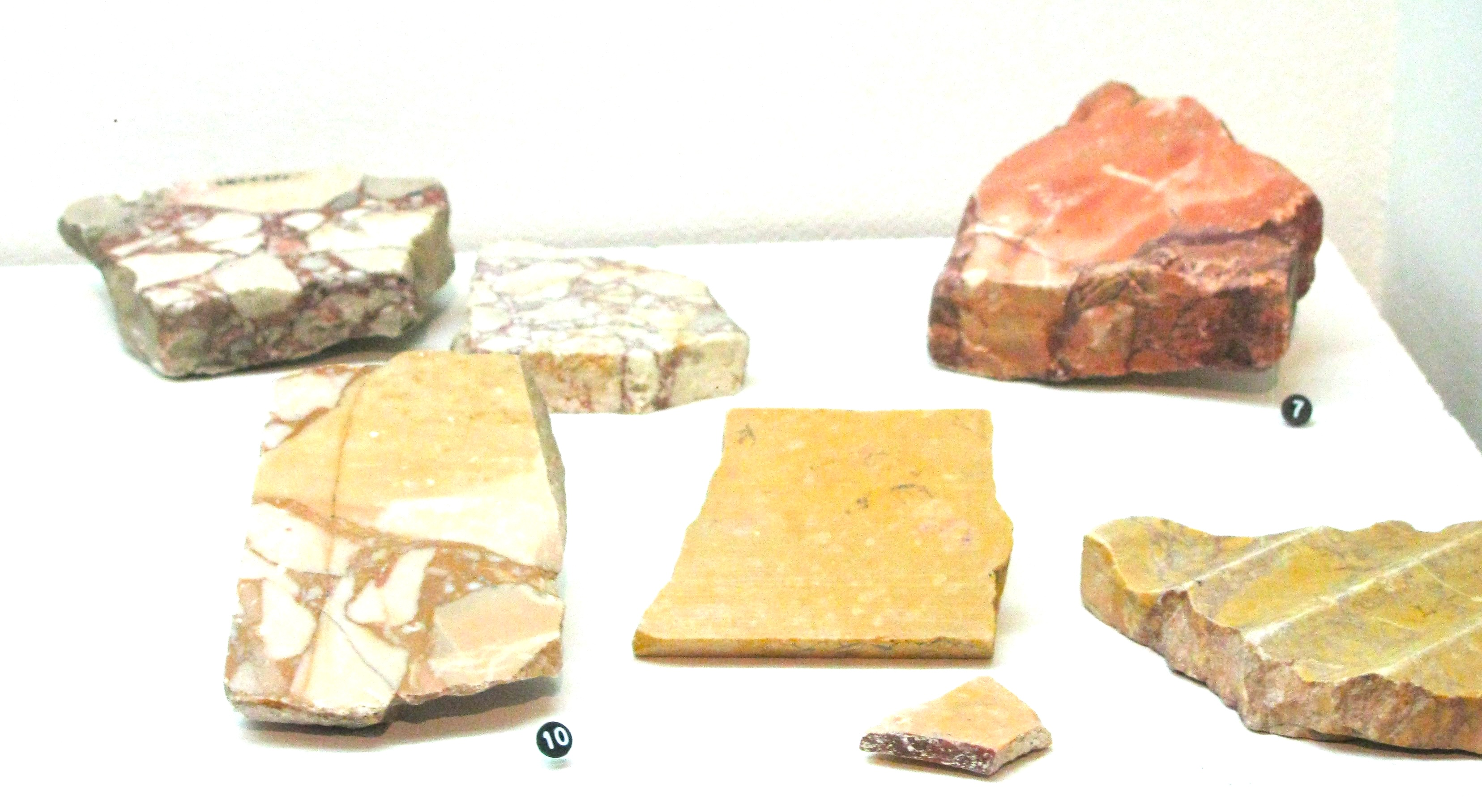 Musée gallo-romain de Lyon : échantillon de marbres antiques 10 = giallo antico de Chemtou ; arrière plan : à gauche, Brèche de Scyros (Grèce), à droite, 7 = marbre portasanta de Chios (Grèce)